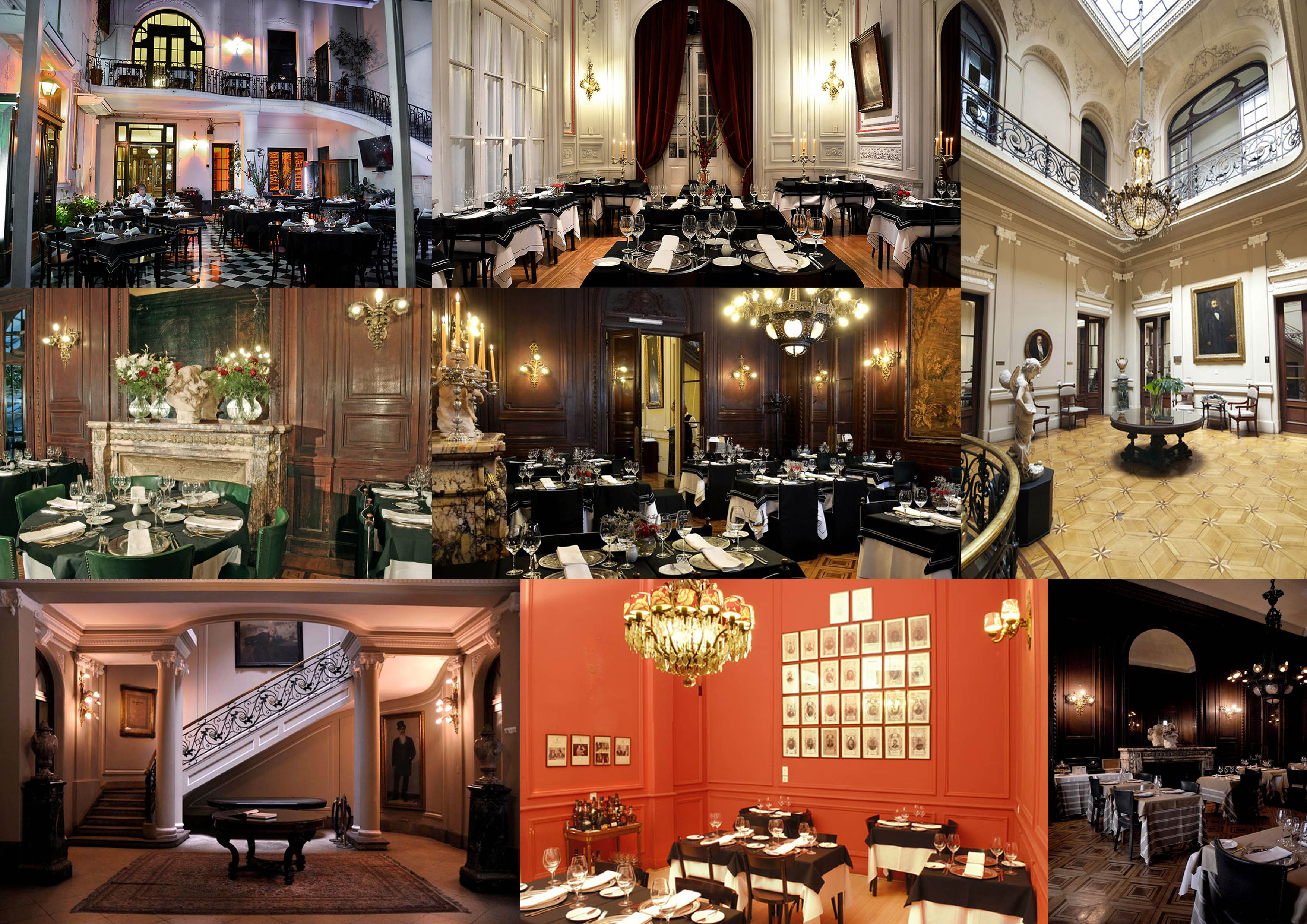 Espacios interiores del lugar